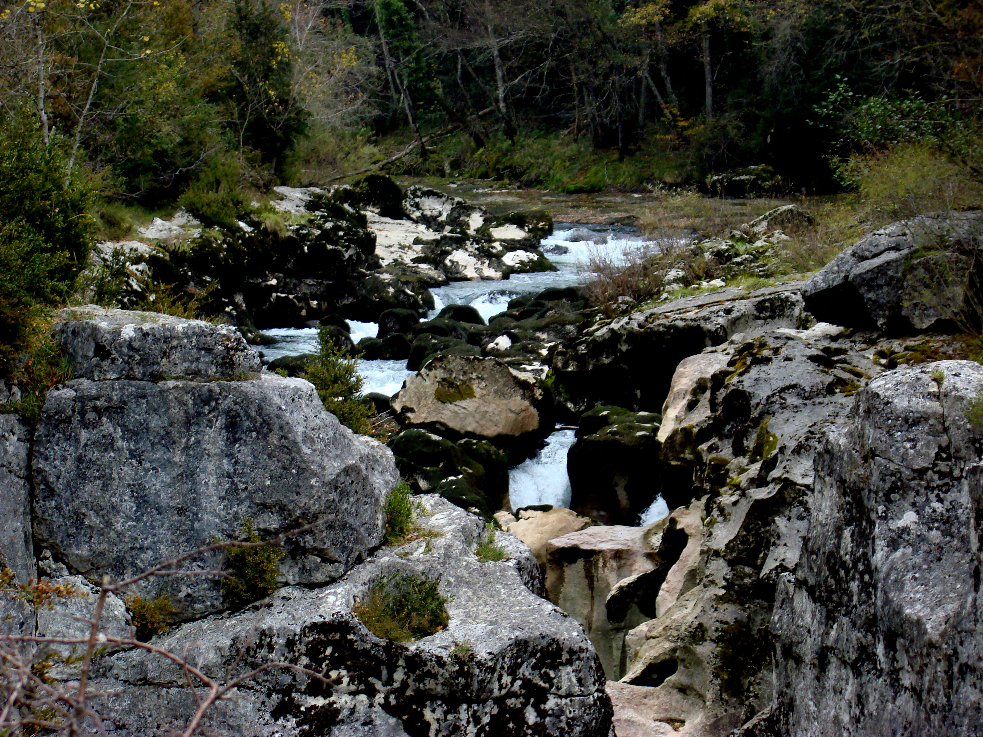 Près de Bellegarde sur Valserine